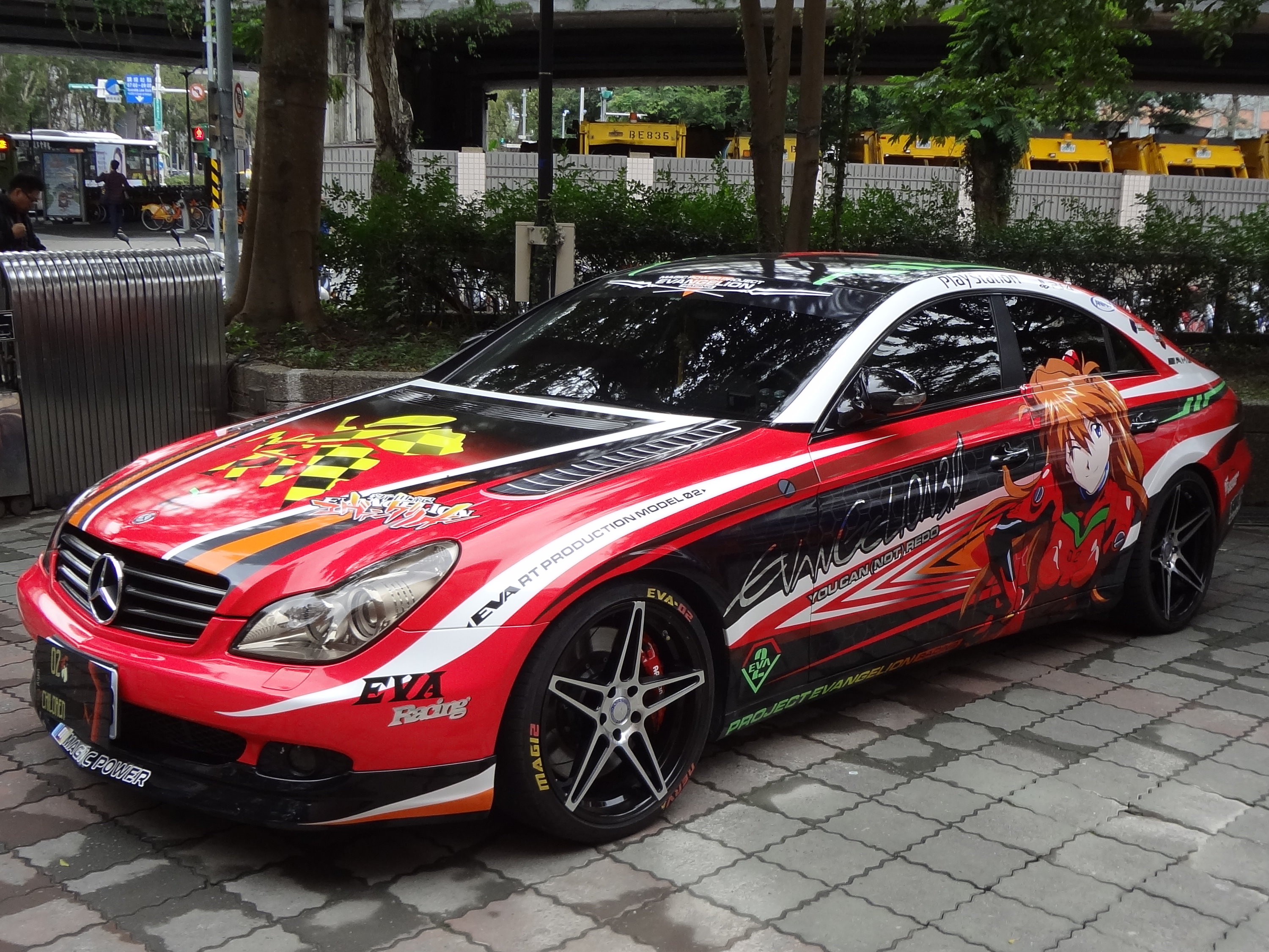 中文（台灣）: 第44屆台灣同人誌販售會，梅賽德斯-賓士C219《新世紀福音戰士》EVA貳號機與惣流（式波）·明日香·蘭格雷痛車。